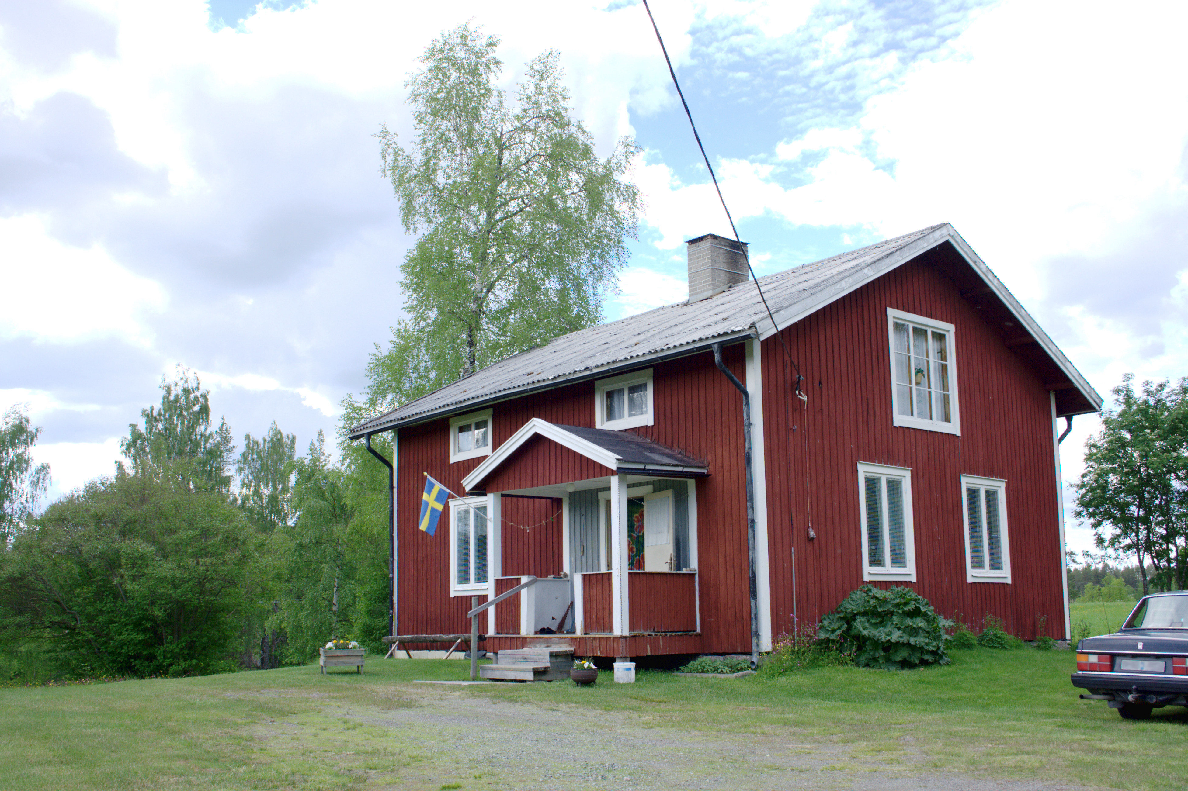 Kronolägenheten Nyhamn